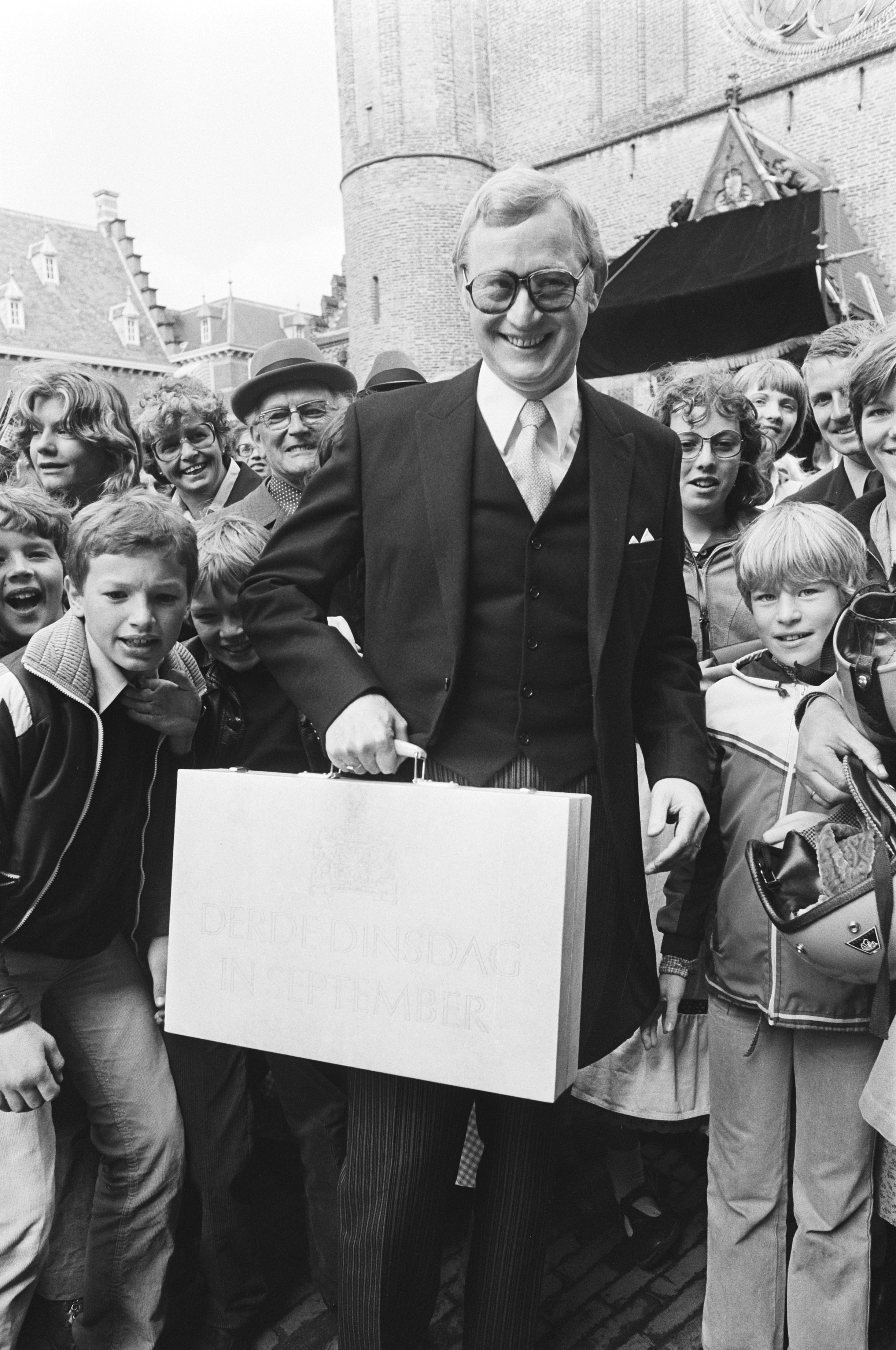 Collectie / Archief : Fotocollectie Anefo Reportage / Serie : [ onbekend ] Beschrijving : Opening Staten Generaal , Prinsjesdag 78; minister Andriessen en miljardenkoffertje in Tweede Kamer Datum : 19 september 1978 Locatie : Den Haag Trefwoorden : ministers Persoonsnaam : Andriessen, Frans Fotograaf : Verhoeff, Bert / Anefo Auteursrechthebbende : Nationaal Archief Materiaalsoort : Negatief (zwart/wit) Nummer archiefinventaris : bekijk toegang 2.24.01.05 Bestanddeelnummer : 929-9090